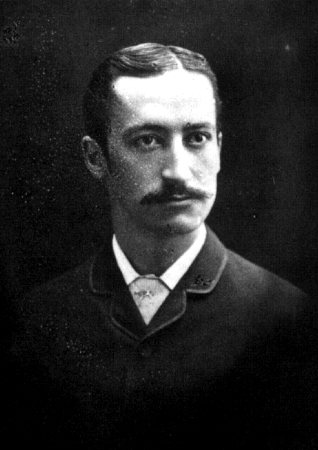 José Antonio de Lavalle (1833-1893) escritor y diplomático peruano